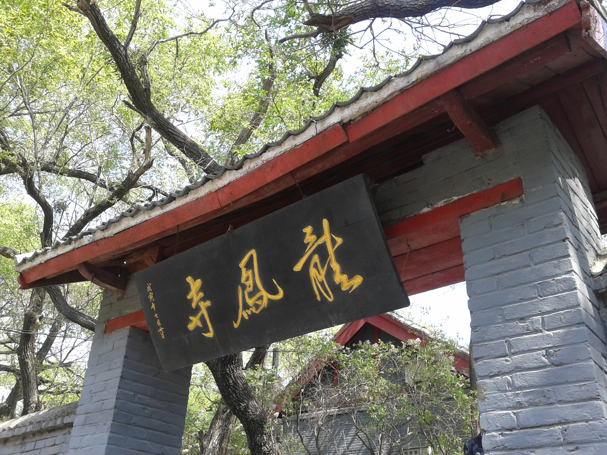 龙凤寺牌匾